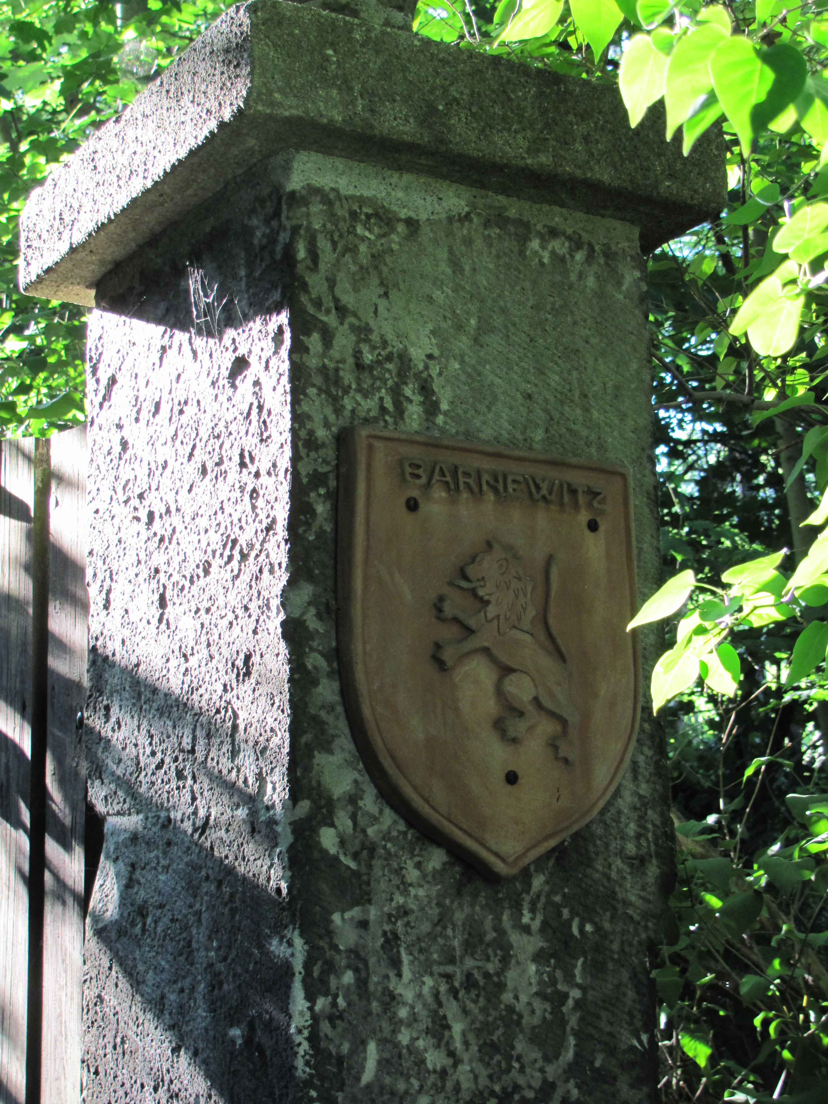 Auf den Bergen